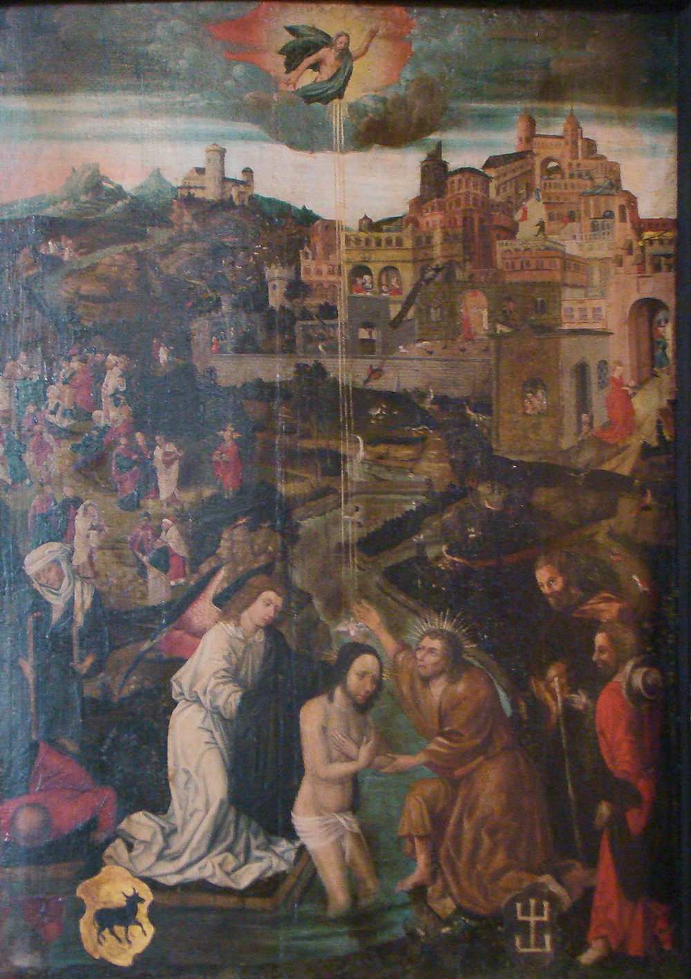 Altes Gemälde in der Stadtkirche Bad Wimpfen